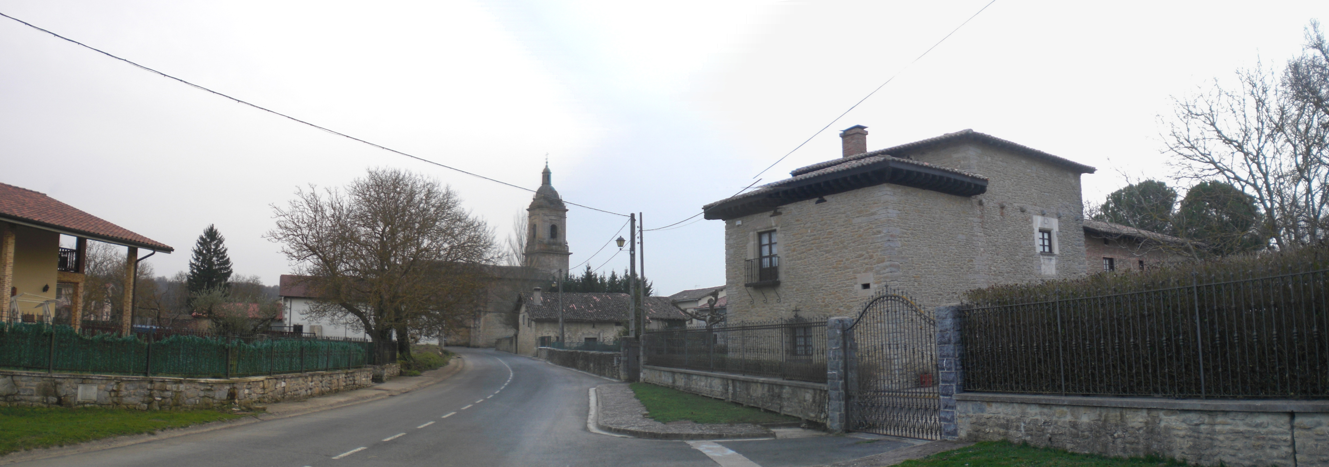 Gasteizko Oreitiako ikuspegia.